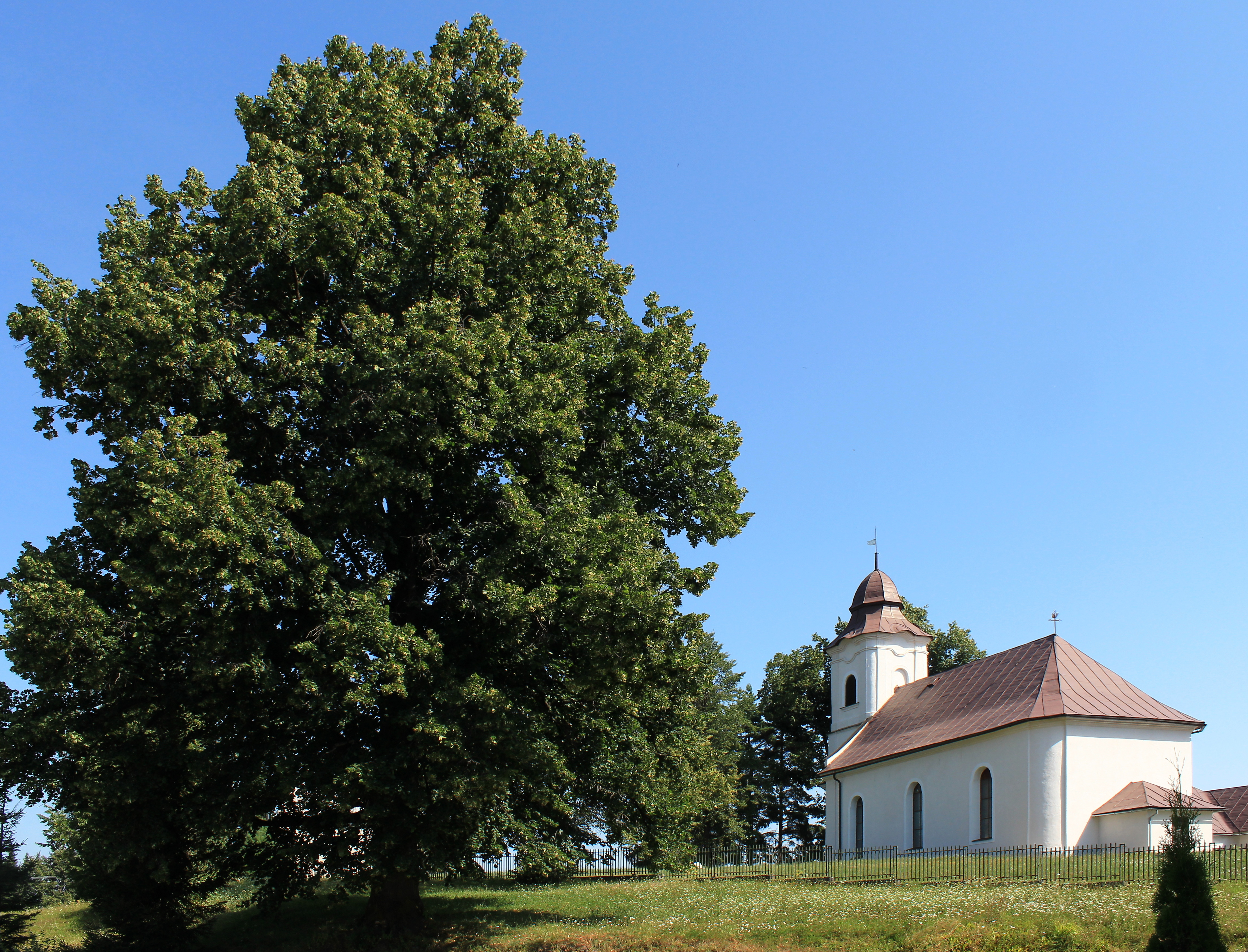 kostol v Hrochoti s pamätnou lipou Andreja Braxatorisa Sládkoviča